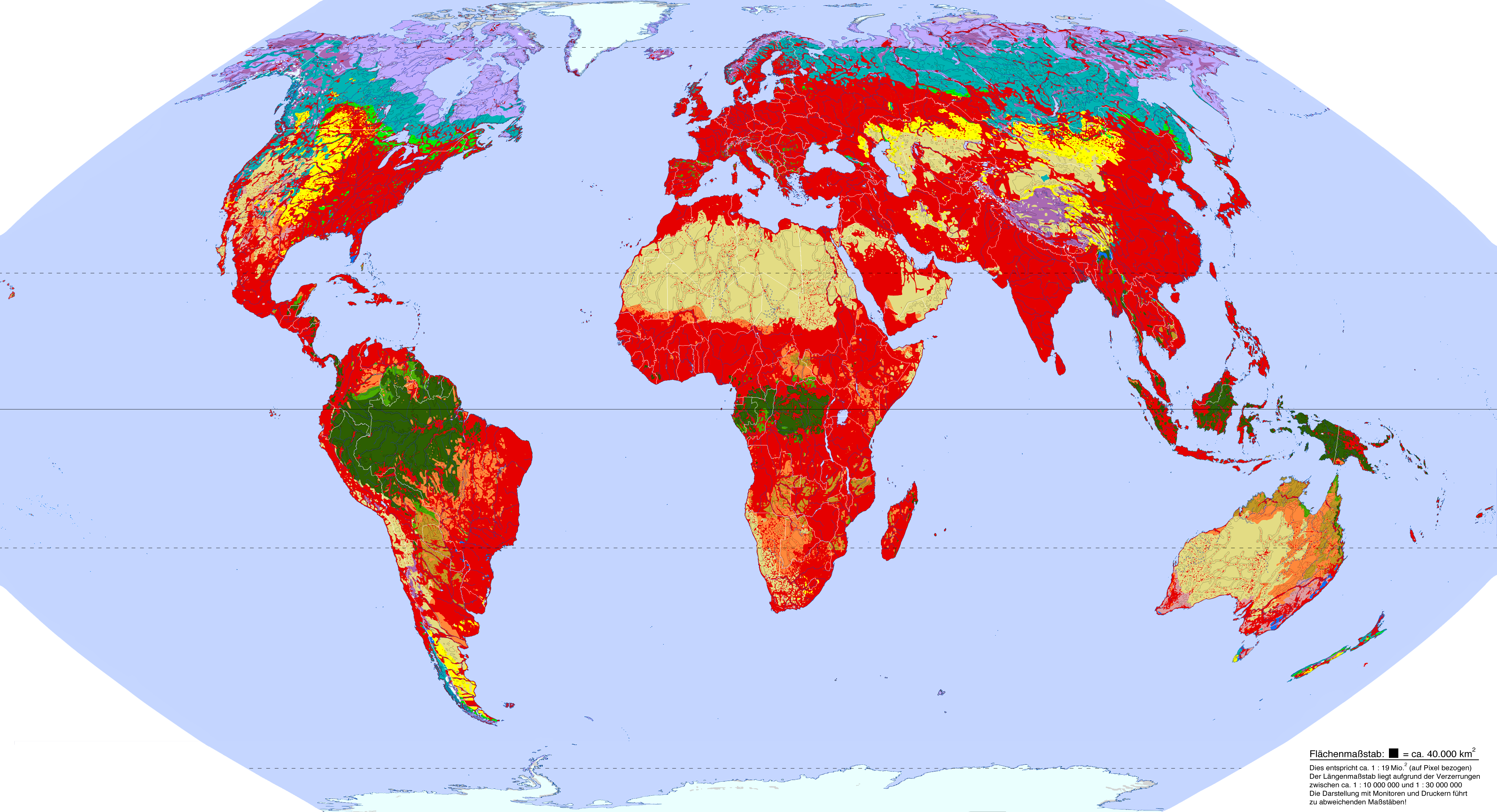 Eisschilde und Gletscher Polare Kältewüsten Tundren Alpine Hochgebirgsregionen Temperierte Nadelwälder Temperierte Laub- und Mischwälder Temperierte Steppen Wüsten und Halbwüsten Subtropische Trockenvegetation Subtropische Feuchtwälder Tropische Trockenwälder Tropische Savannen Tropisch-/Subtropische Feuchtwälder Tropische Regenwälder Vom Menschen überprägt